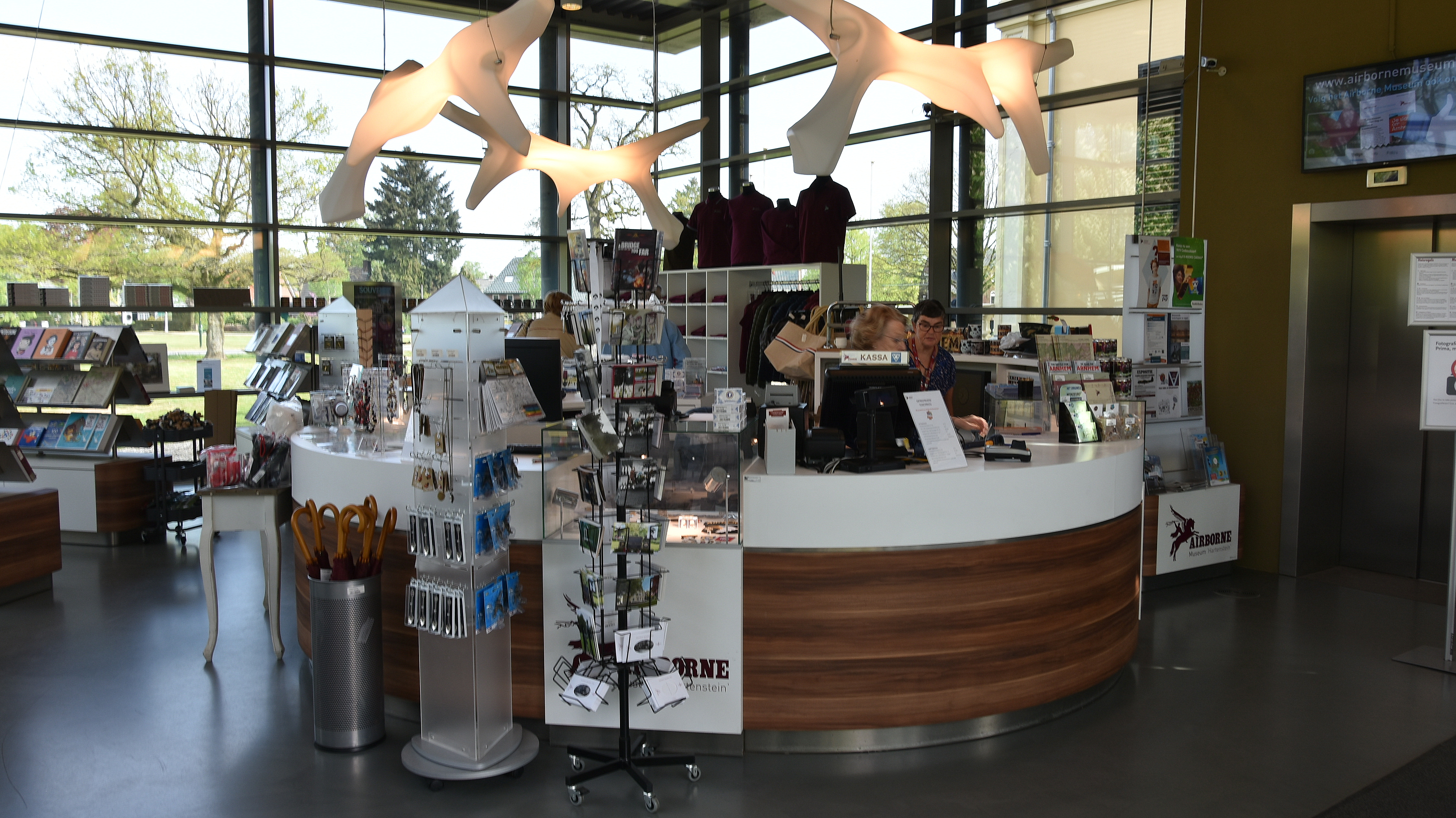 Airborne Museum Hartenstein Oosterbeek 23-04-2019 9-39-17